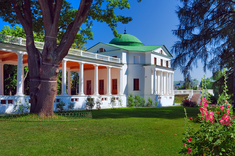 Главный дом с двумя флигелями (Москва и Московская область, Щербинка, село Остафьево)